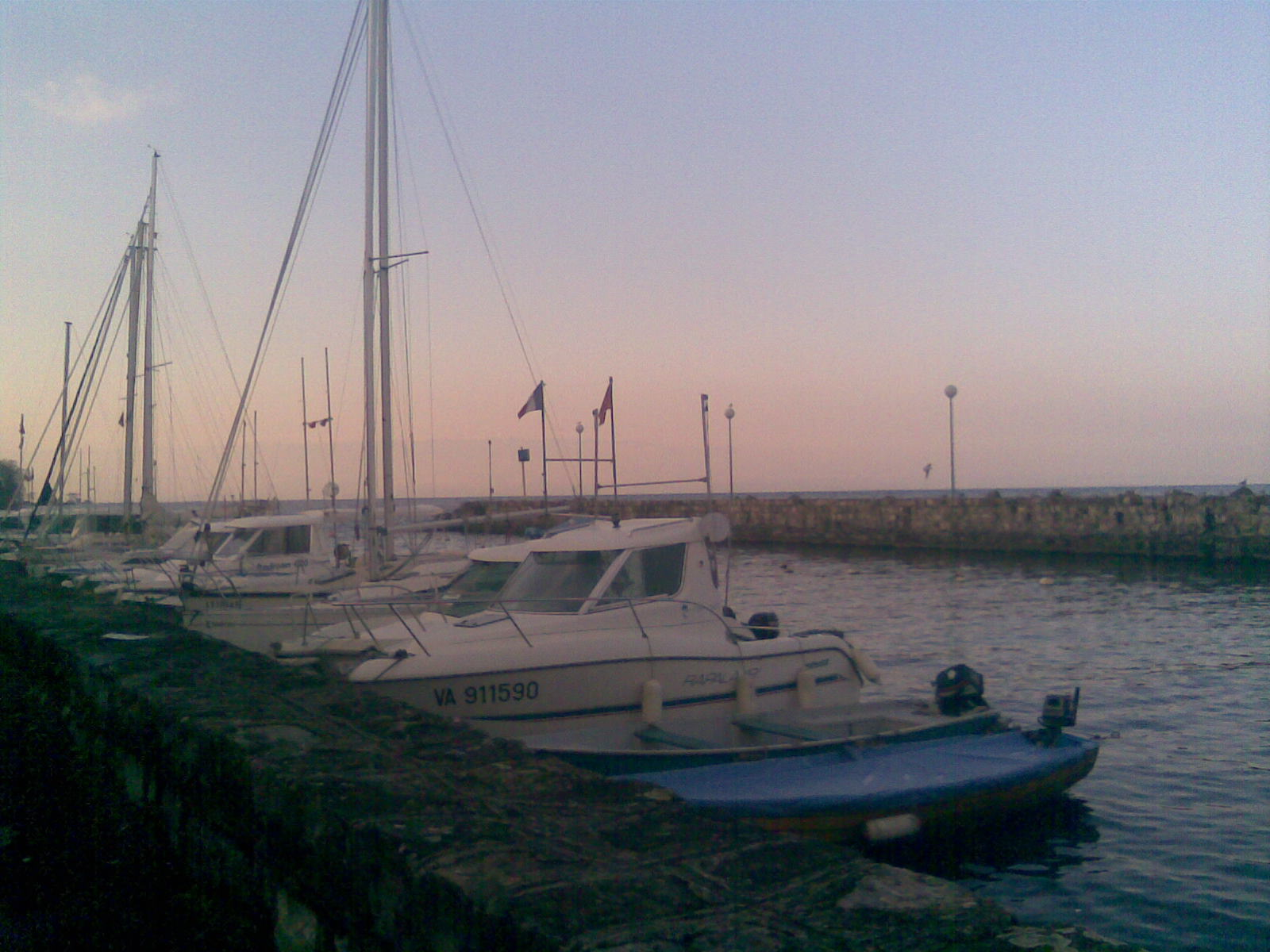 Le port de plaisance d'Amphion-les-bains.